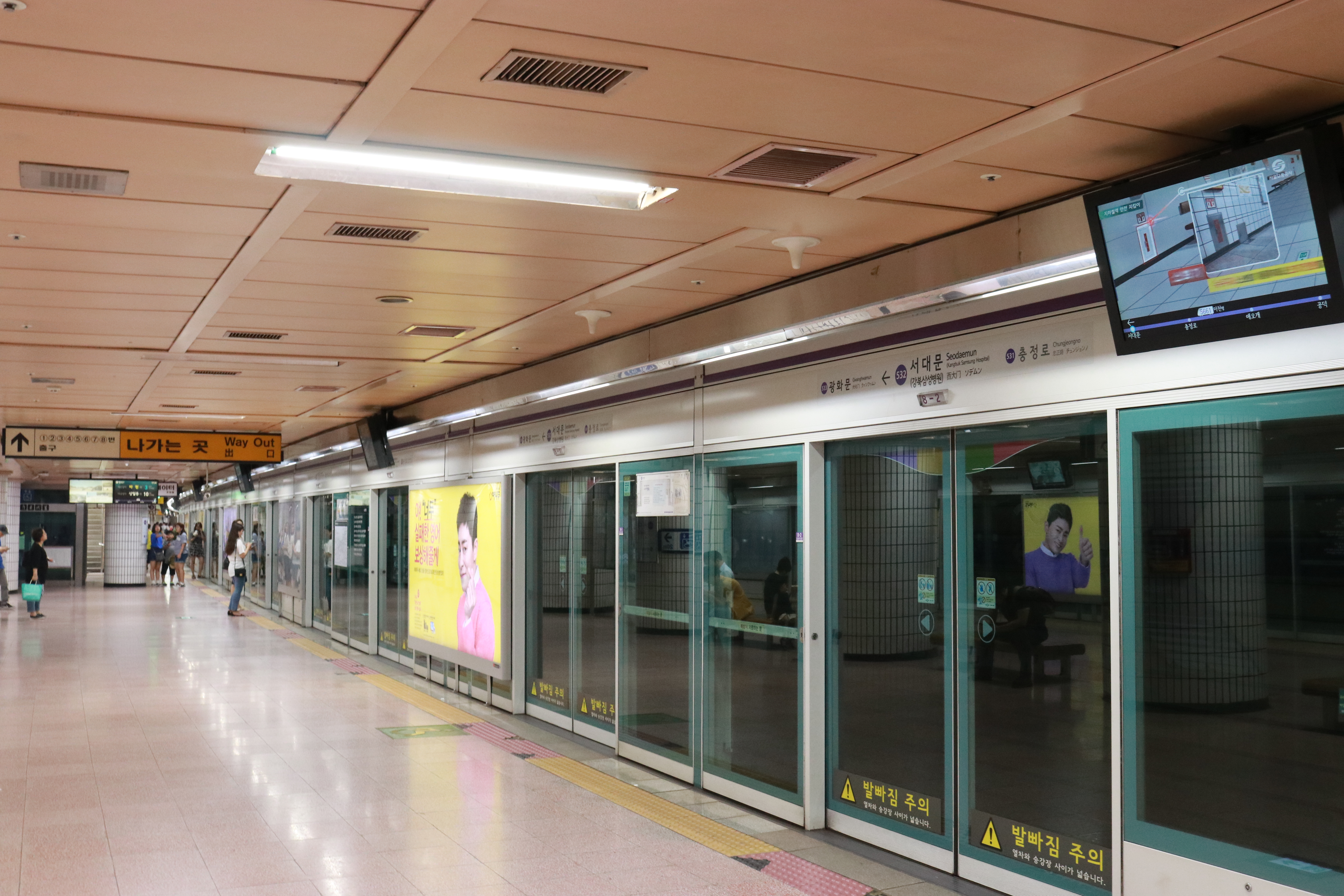 서대문역 승강장